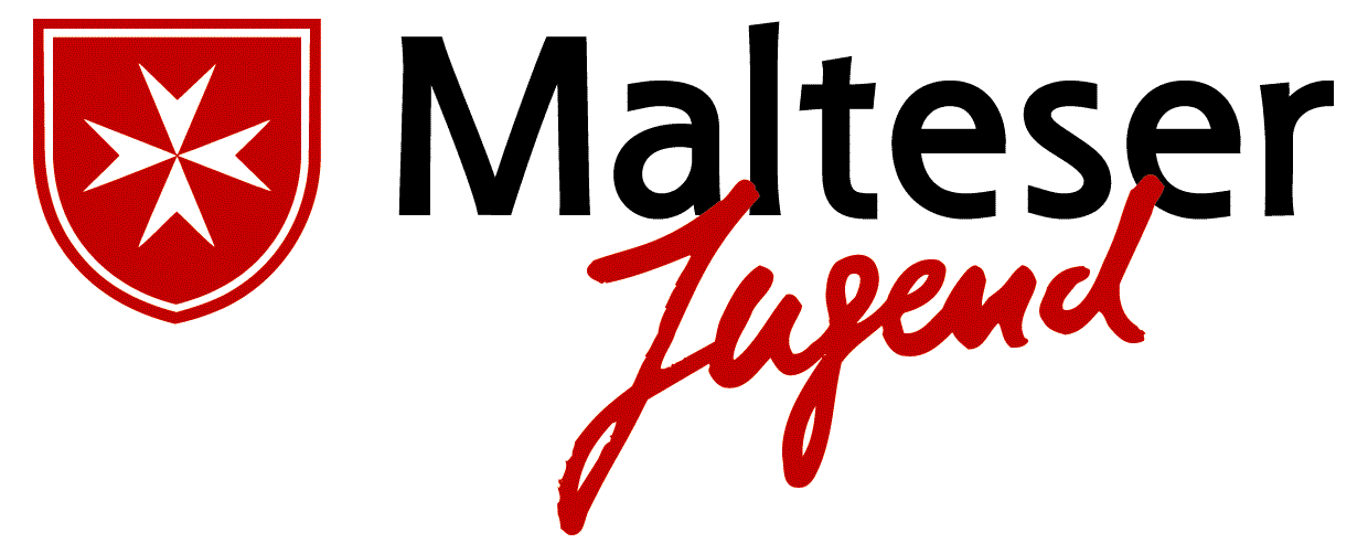 Logo der Malteser Jugend Deutschland